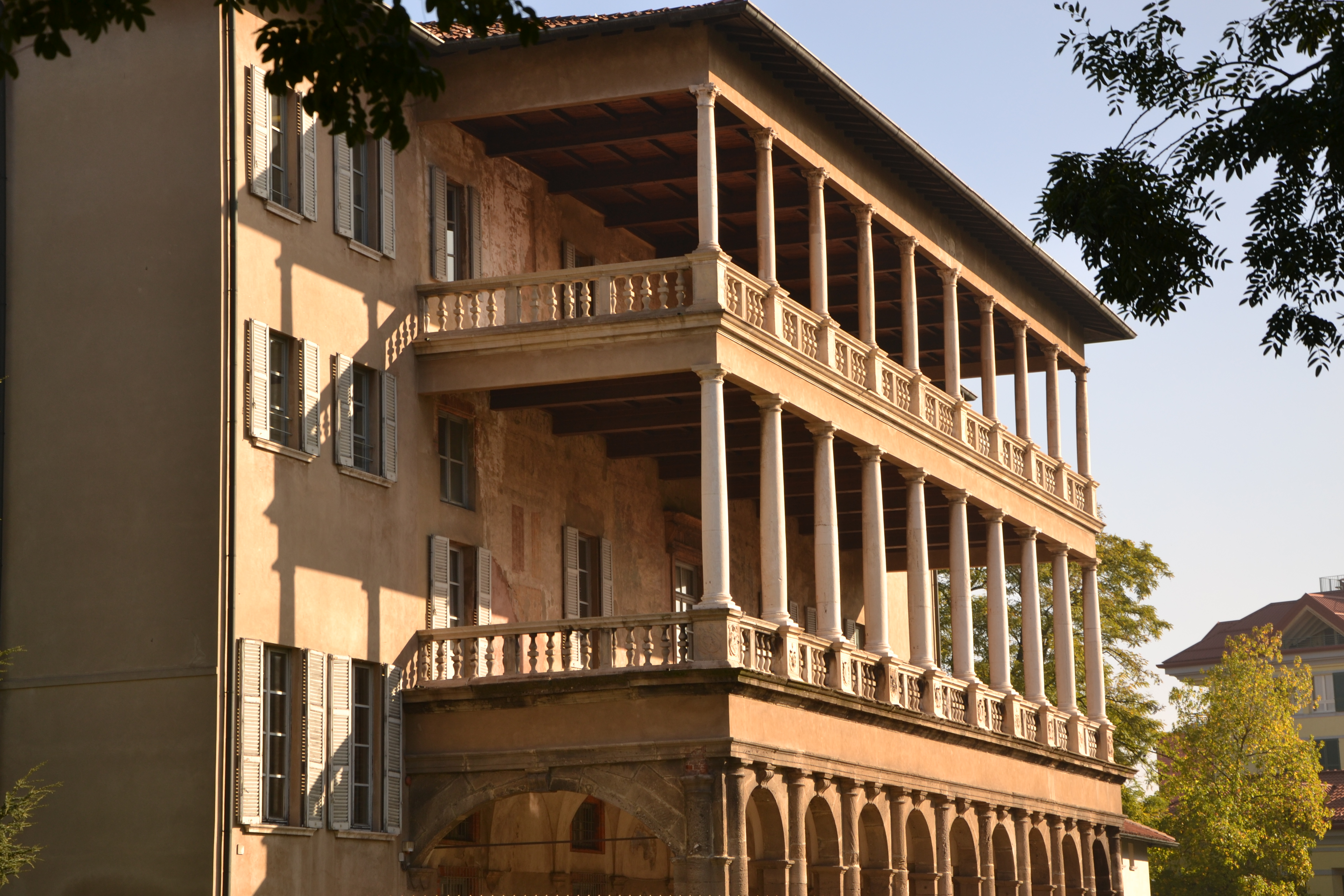 Villa Simonetta è una villa patrizia rinascimentale situata a Milano in via Stilicone 36, edificata alla fine del XV secolo Oggi la villa è di proprietà comunale